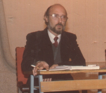 José María Vidal Villa. Conferencia en Trujillo (1980)